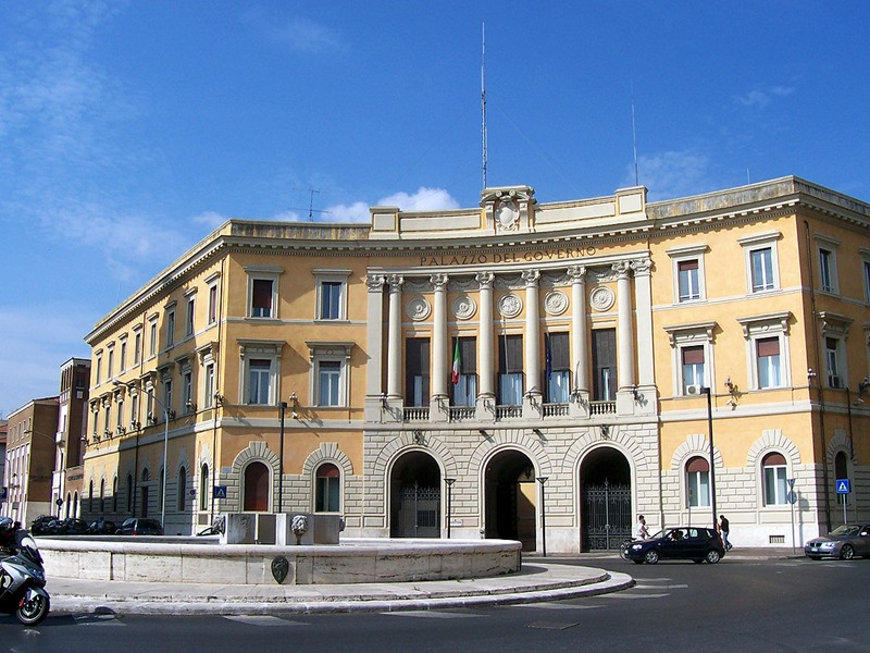 Grosseto - Palazzo del Governo (Prefettura)